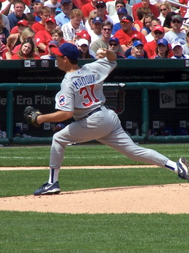 Greg Maddux in 2006